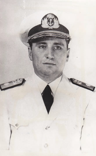 Almirante Alberto Pablo Vago en 1955 o 1956.